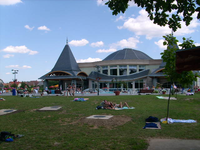 Szigetvári strandfürdő (Baranya megye, Magyarország)